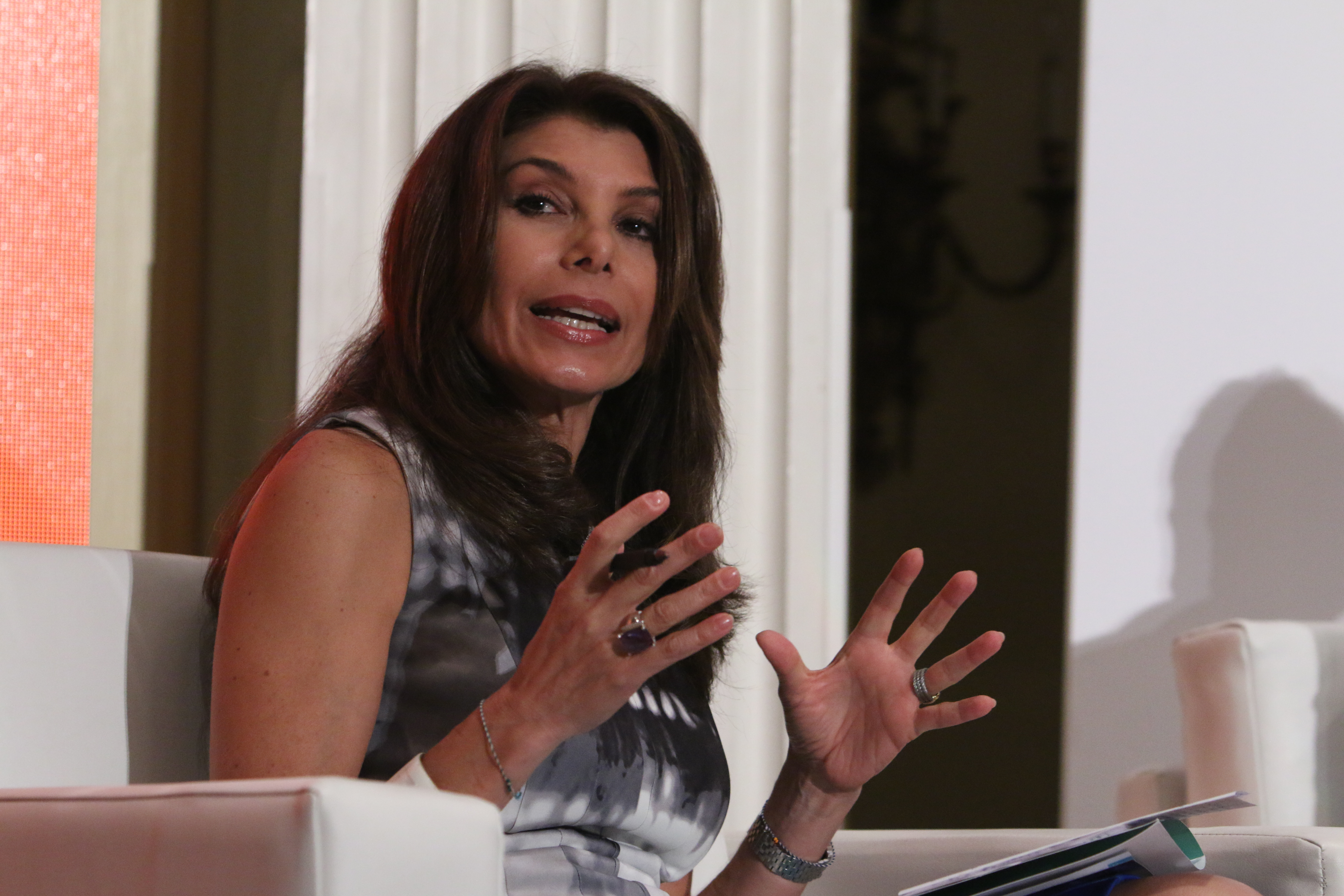 CNN en Español's Patricia Janiot